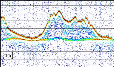 Zelf gemaakt